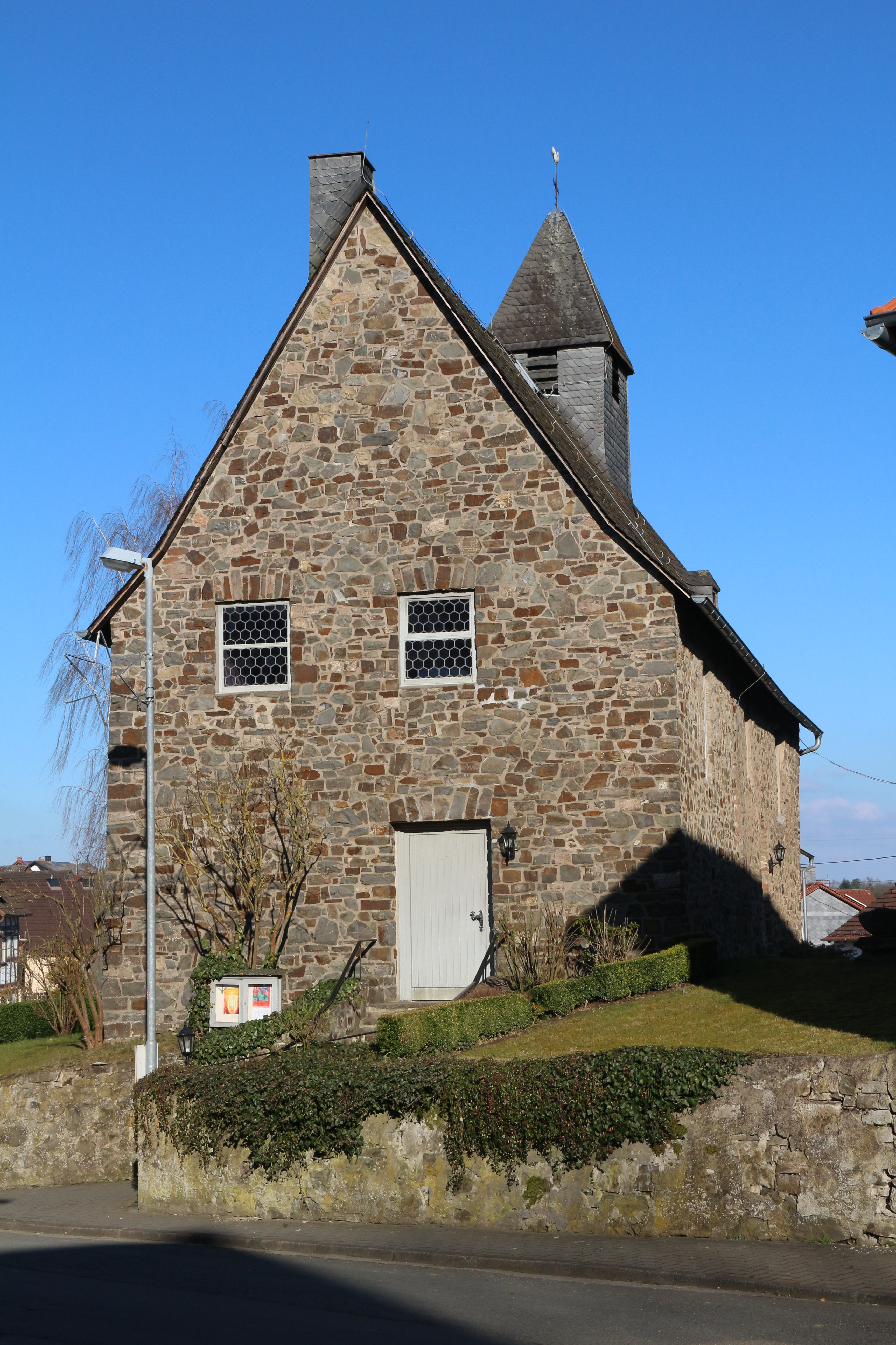 Ev. Kirche